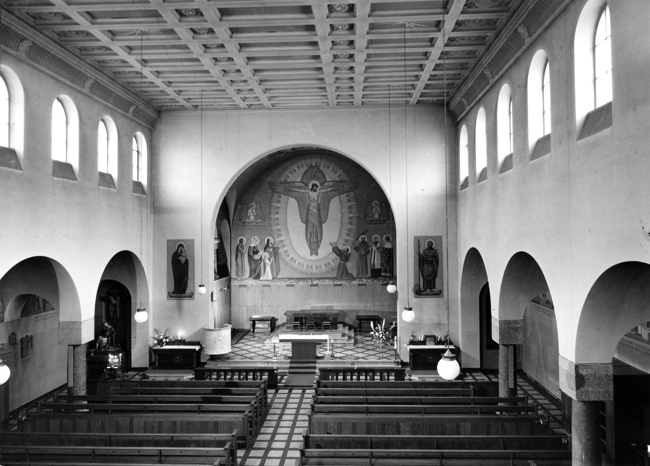 Römisch-katholische Pfarrkirche St. Franziskus Zürich-Wollishofen, Innenansicht vor 1972